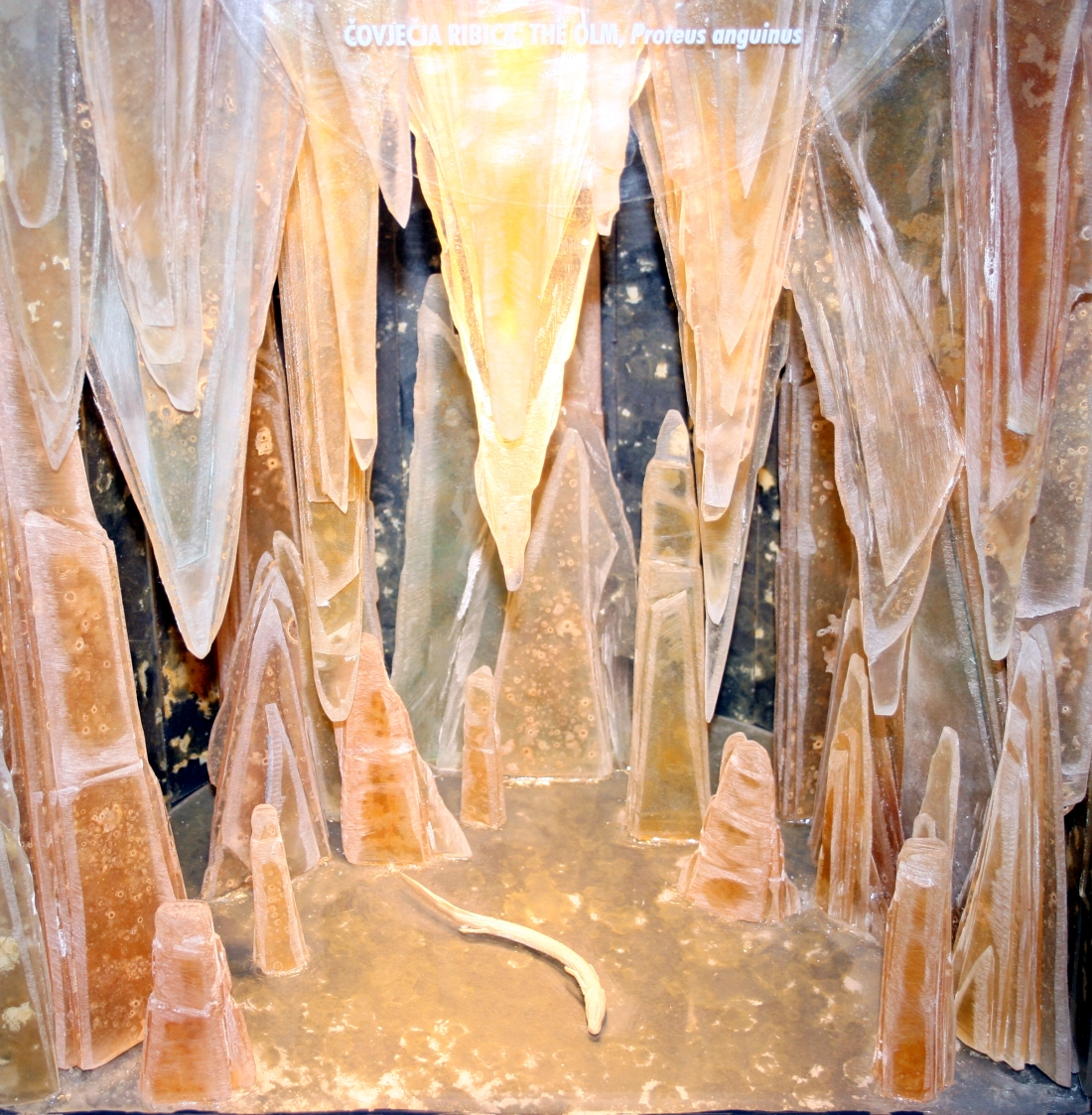 Čovječa ribica (Proteus anguinus) u Prirodoslovnom muzeju Rijeka